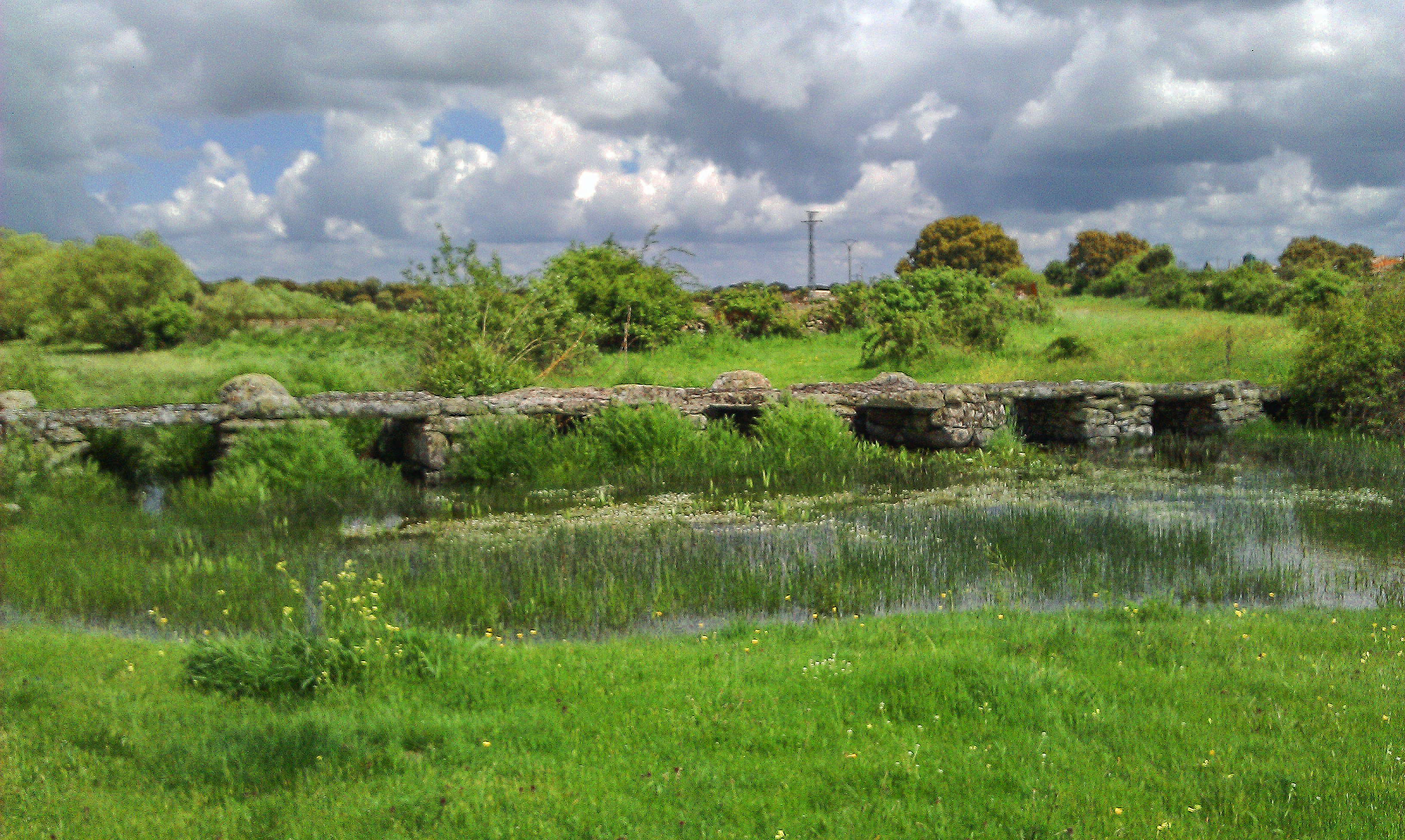 La puente de Puertas (resto histórico)